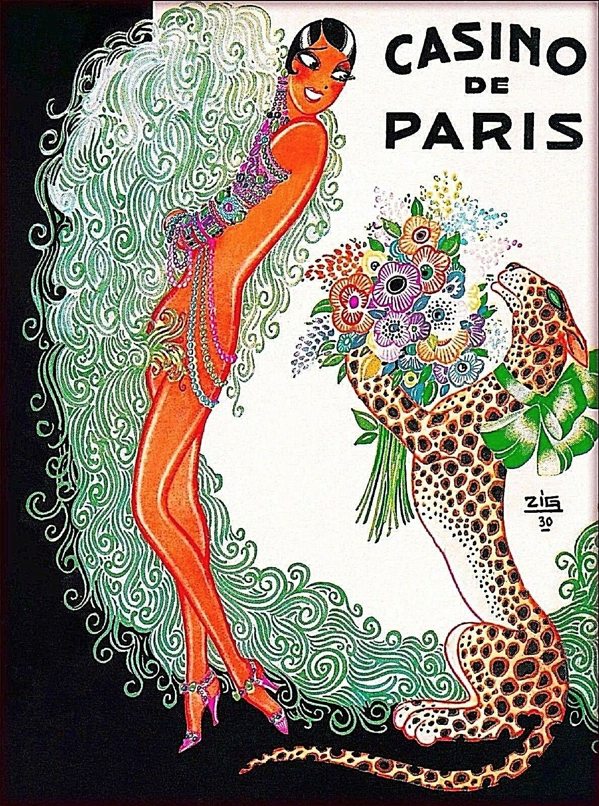 Casino de Paris - Josephine Baker